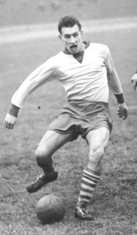 ADN-ZB-Bey-Wen. Mü. 9.12.1956 Vorwärts erreichte Pokalendspiel - Am Sonntag, dem 9.12.1956, standen sich im Berliner Jahn-Stadion im FDGB-Vorschlussrundenspiel der Fußballer die Mannschaften von Vorwärts Berlin und Wismut Karl-Marx-Stadt gegenüber. Durch einen 2:0 Sieg erkämpfte sich die Berliner Mannschaft den Einzug in das Finale. UBz: In diesem Augenblick fiel das 1:0. Assmy (links) schob den Ball überlegt am Torwart vorbei zum ersten Treffer ein. Der Wismutverteidiger Bauer (rechts) kam zu spät, um eingreifen zu können.